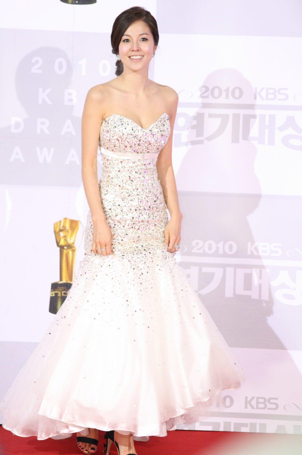 2010 KBS 연기대상